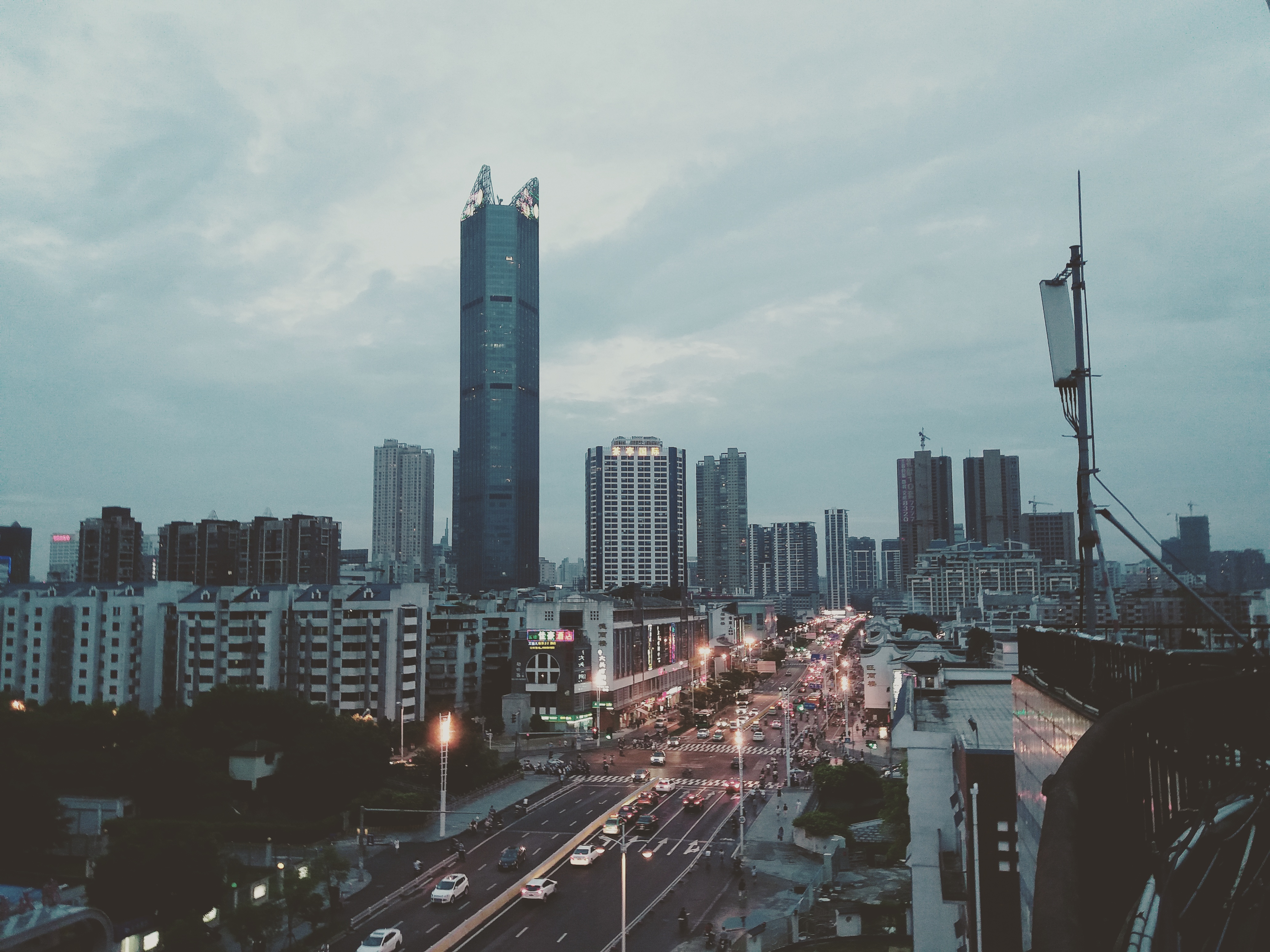 在福州九福商贸大厦南向鸟瞰八一七路。